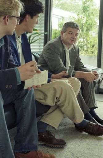 Der Bundestagsabgeordnete und Sprecher der Bundestagsfraktion von Bündnis 90/Die Grünen Joschka Fischer wird von zwei Schülerzeitungsredakteuren im Foyer des Plenargebäudes interviewt. Innenansichten unseres Parlaments. Impressionen während der Parlamentarischen Woche im Juni 1995 in: Der Dreizehnte Deutsche Bundestag. Innenansichten unseres Parlaments. ISBN 3-87576-357-2